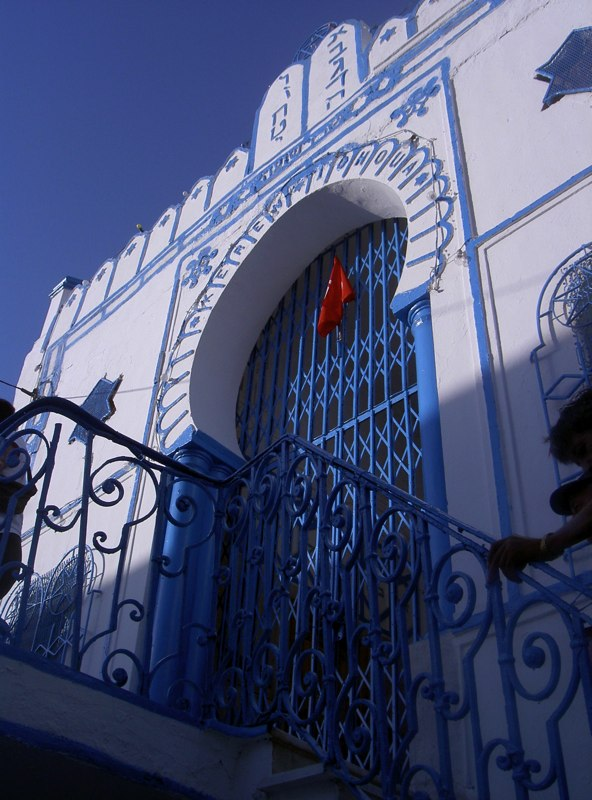 Façade de la synagogue de La Marsa (Tunisie)